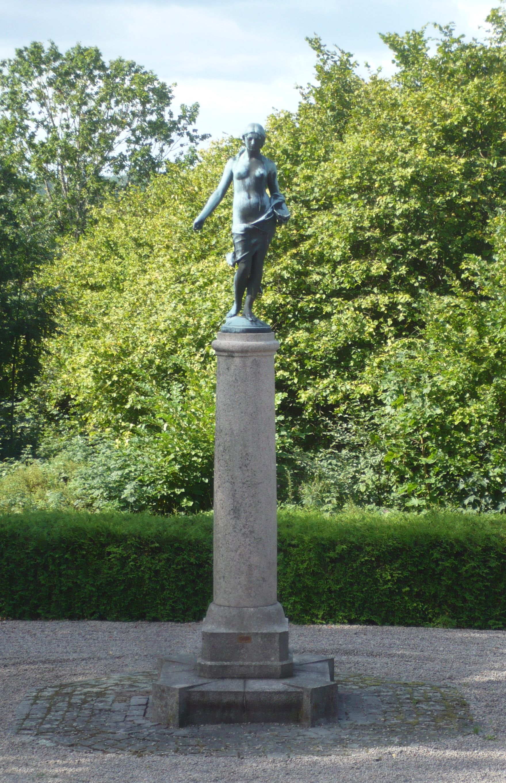 Staty i brons gjuten 1919 vid Otto Meyers konstgjuteri i Stockholm. Samma år placerad vid Blekinge läns folkhögskola i Bräkne-Hoby. Orginalet är utfört av Per Hasselberg 1882-83 i Paris. Första exemplaret av statyn sattes upp 1883 i Brunnsparken i Göteborg.